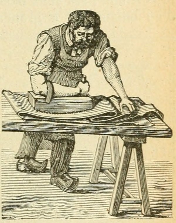 Le tour de la France par deux enfants, par George Bruno, manuel scolaire, édition de 1904.